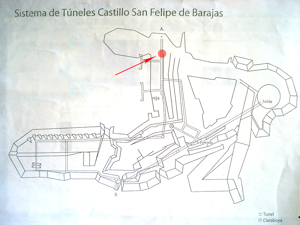 foto de los tuneles